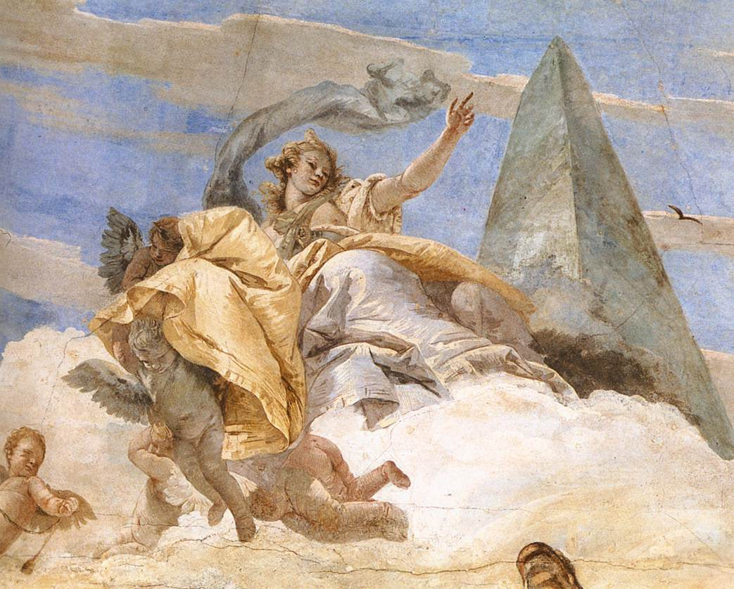 detail